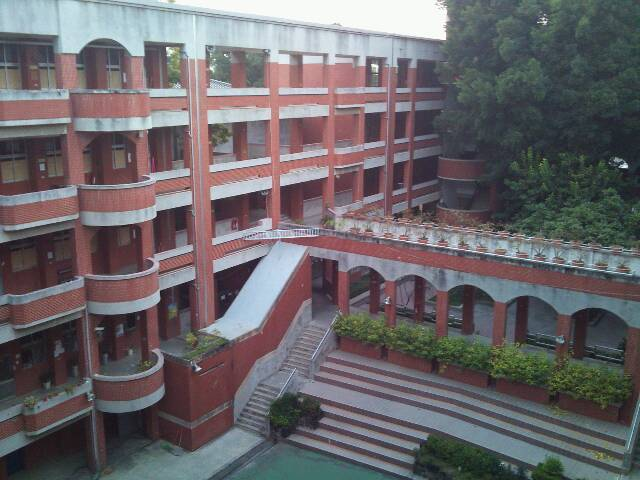 台南二中弘道大樓內觀